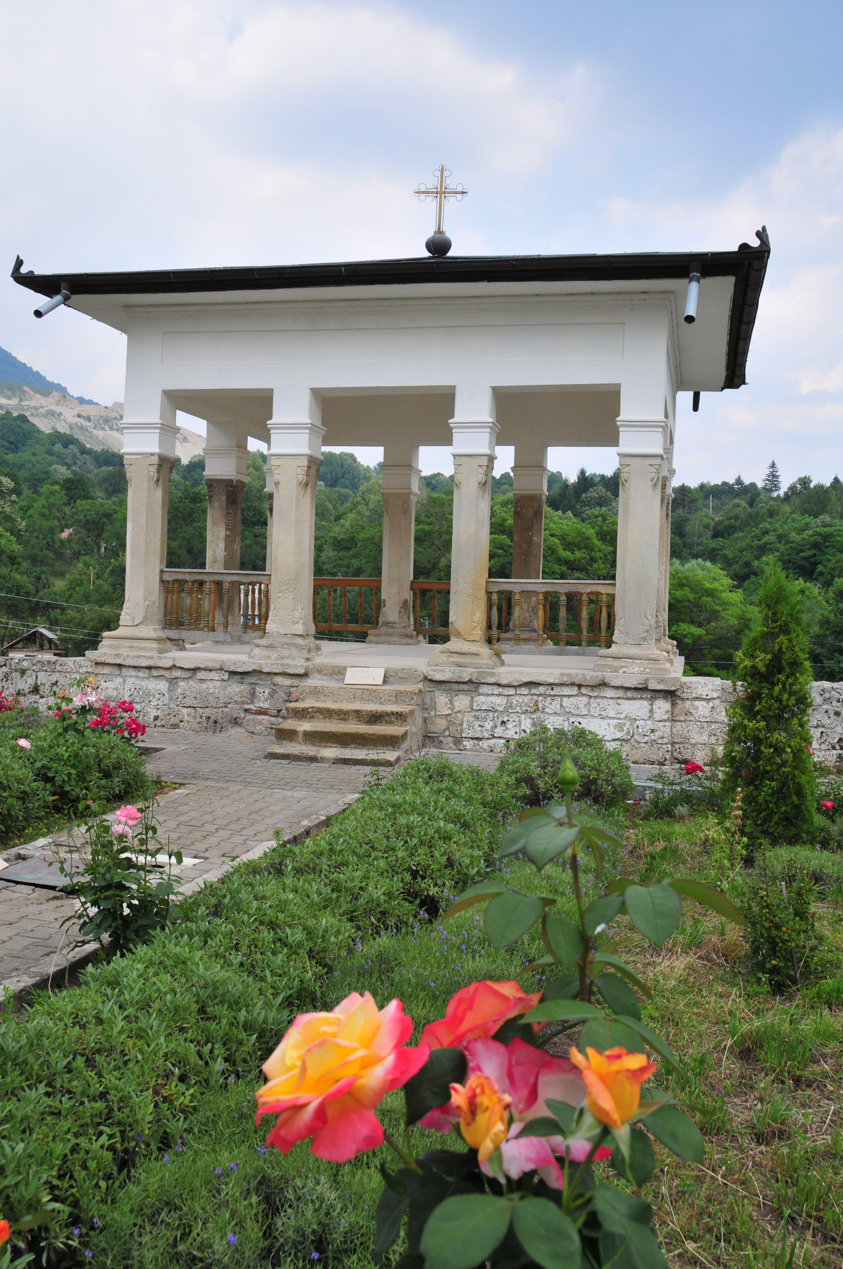 Pavilionul ce surplombează valea Bistriţei 04